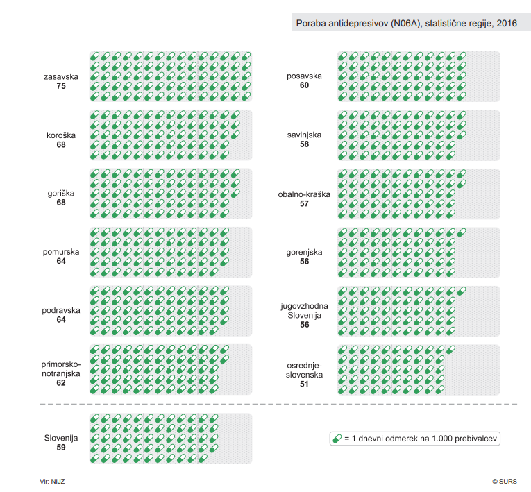 Poraba antidepresivov (N06A), statistične regije, 2016